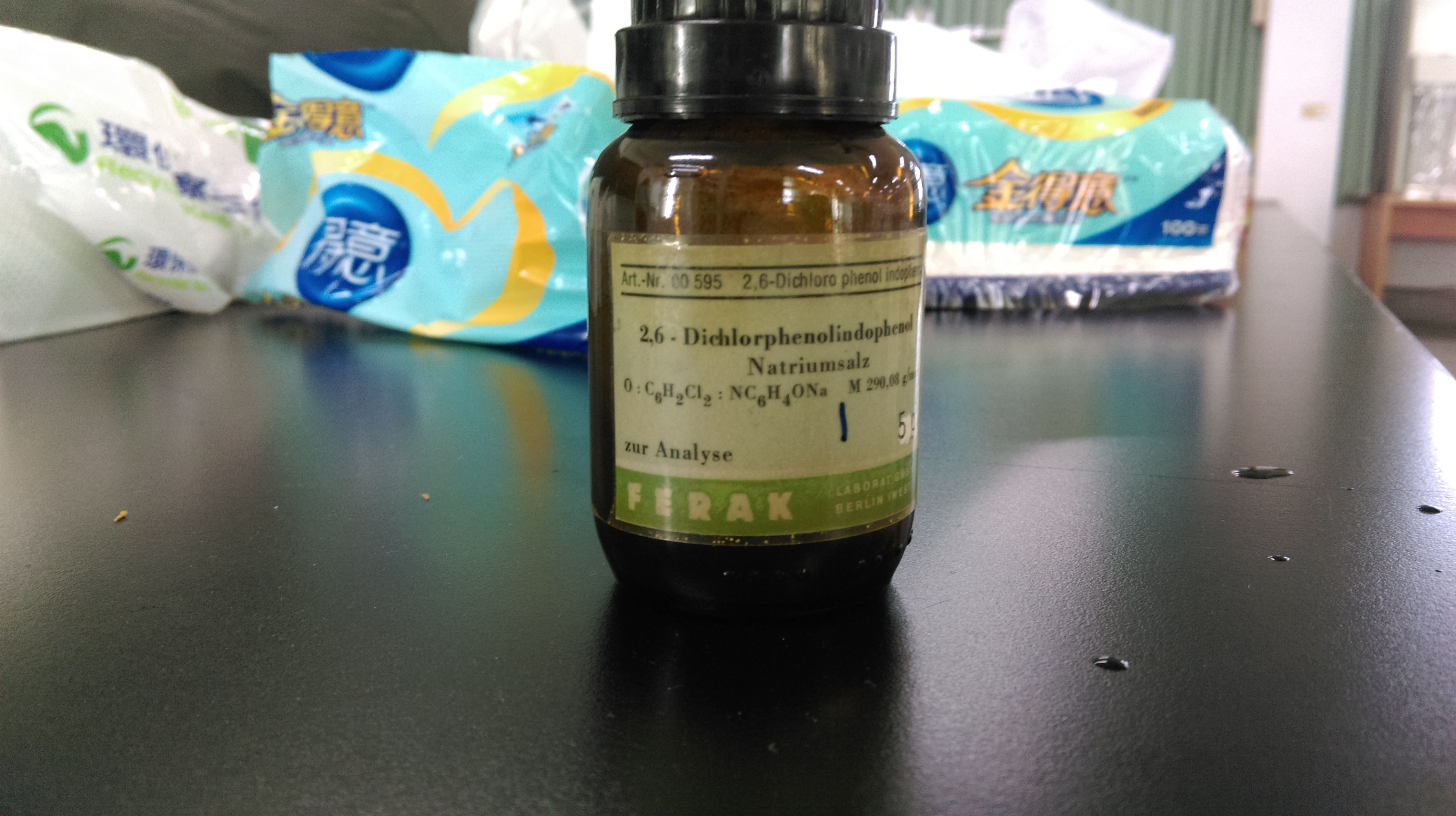 DCPIP